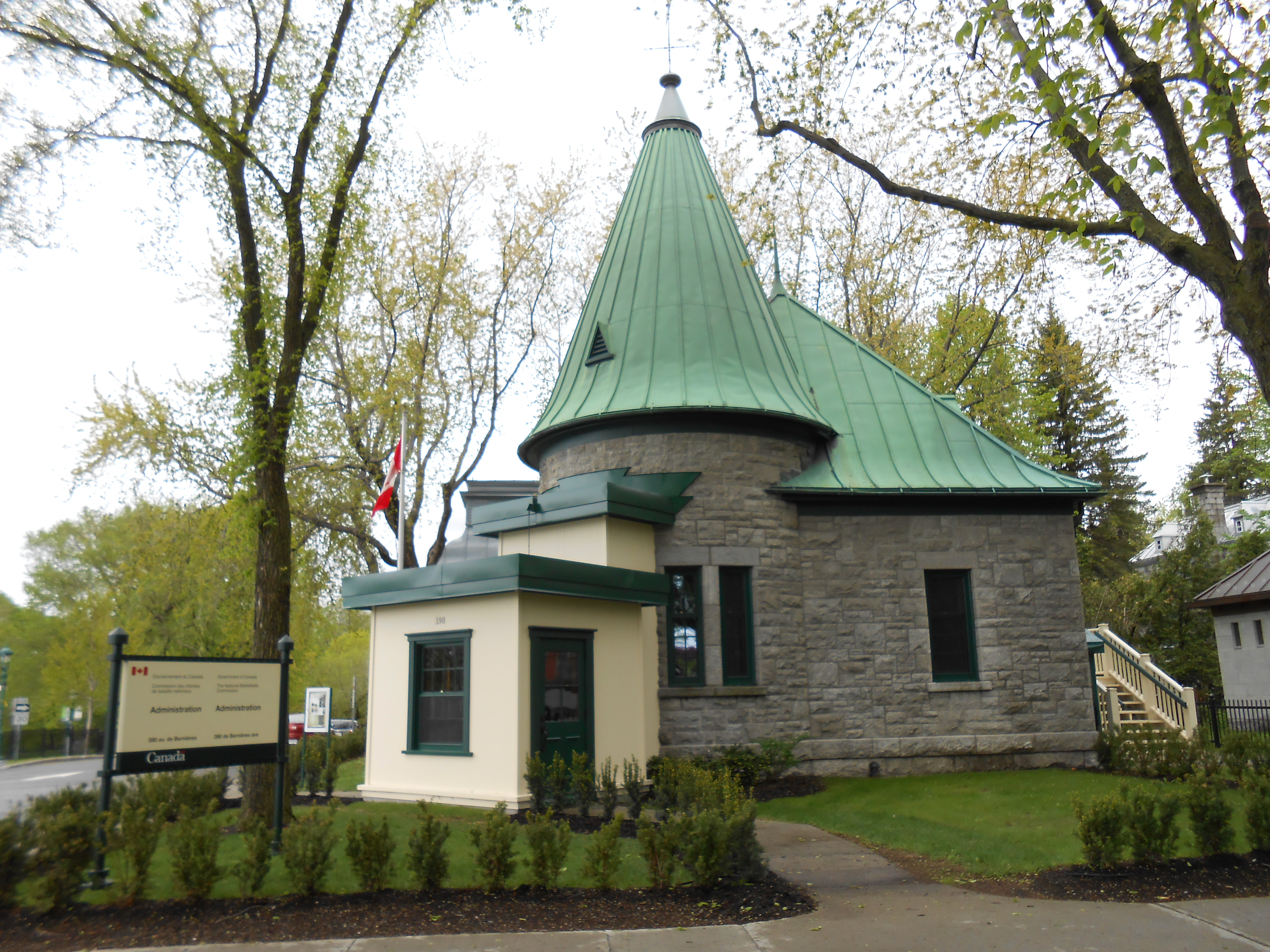 Parc des Champs-de-Bataille, Québec